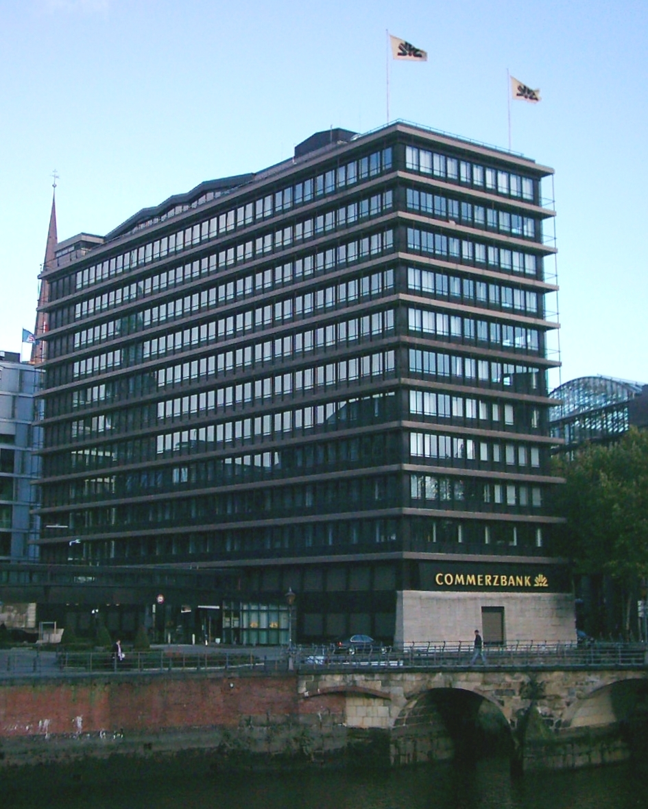 Commerzbank Hamburg-Altstadt. Vorn Hamburgs älteste Fleetbrücke, die Zollenbrücke. This is a photograph of an architectural monument.